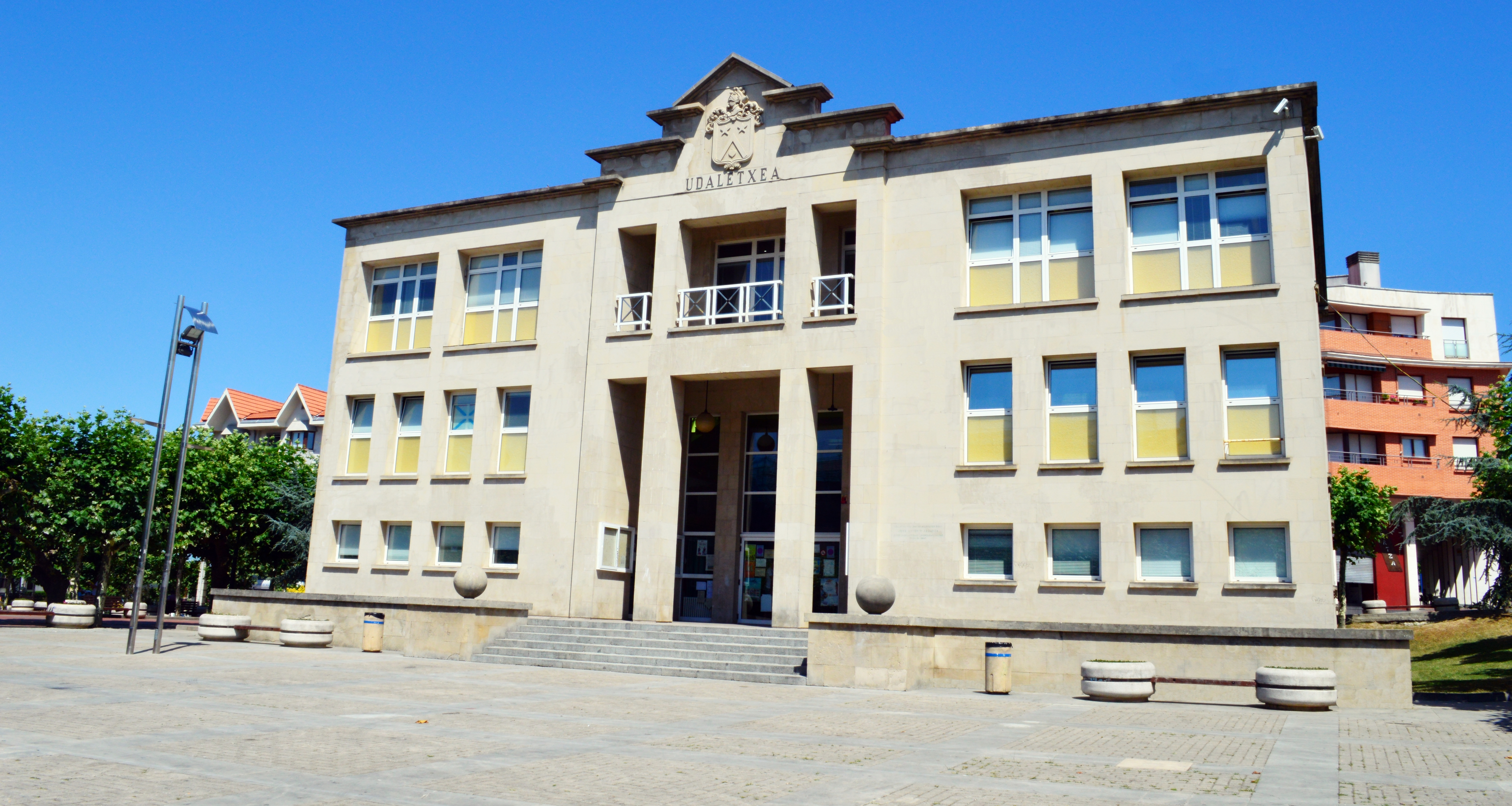 Ayuntamiento de Sopela